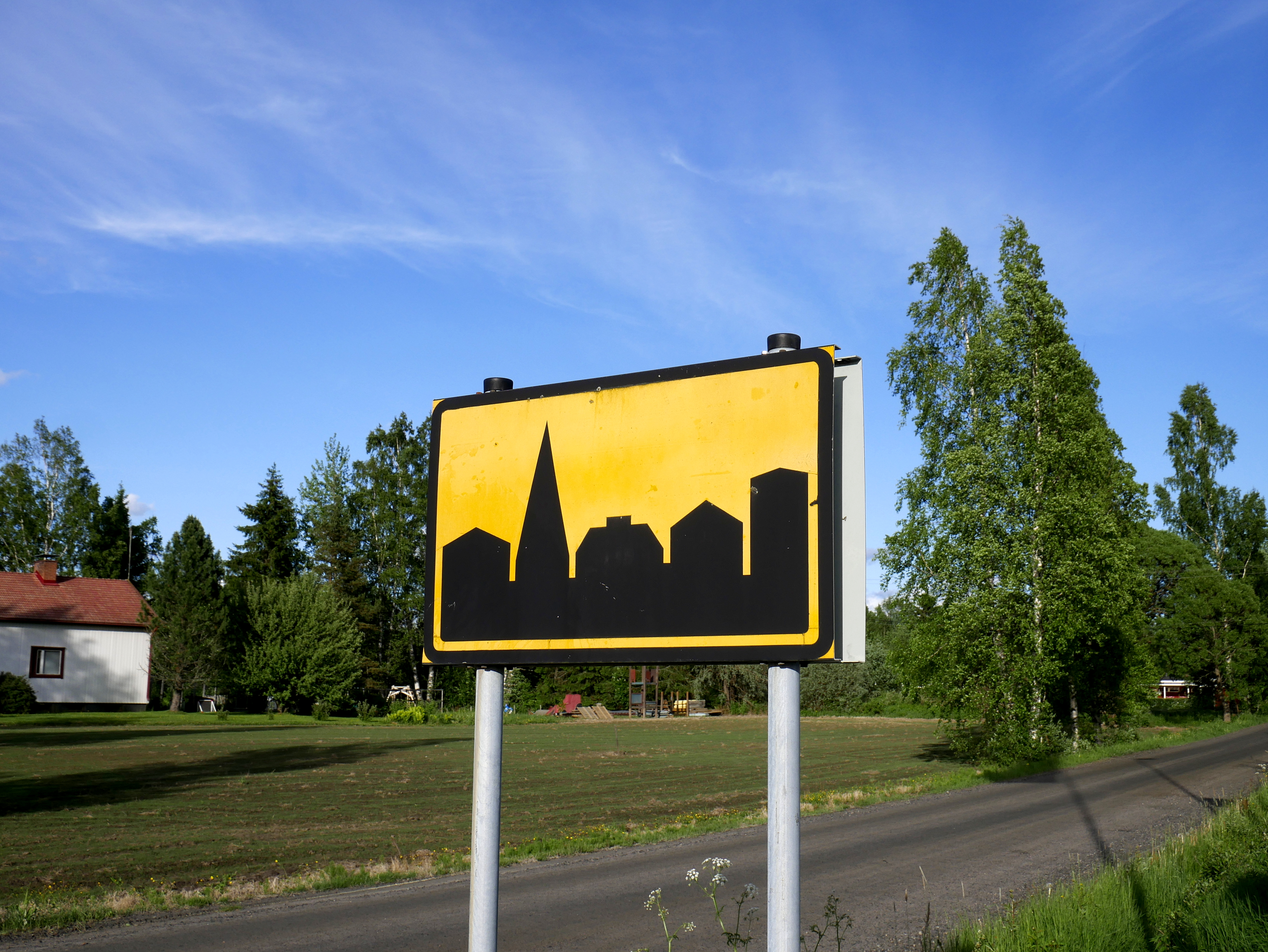 Taajama kyltti.